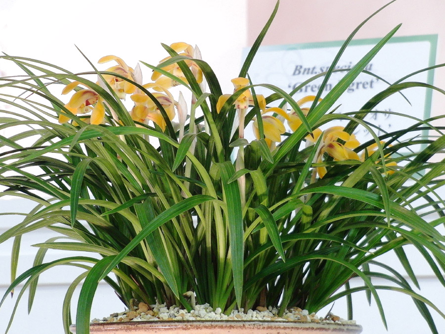 JGP2012【部門1】奨励賞・AOS特別賞 Cym. goeringii 'Fukunohikari' 2012/02/26東京ドームにて撮影